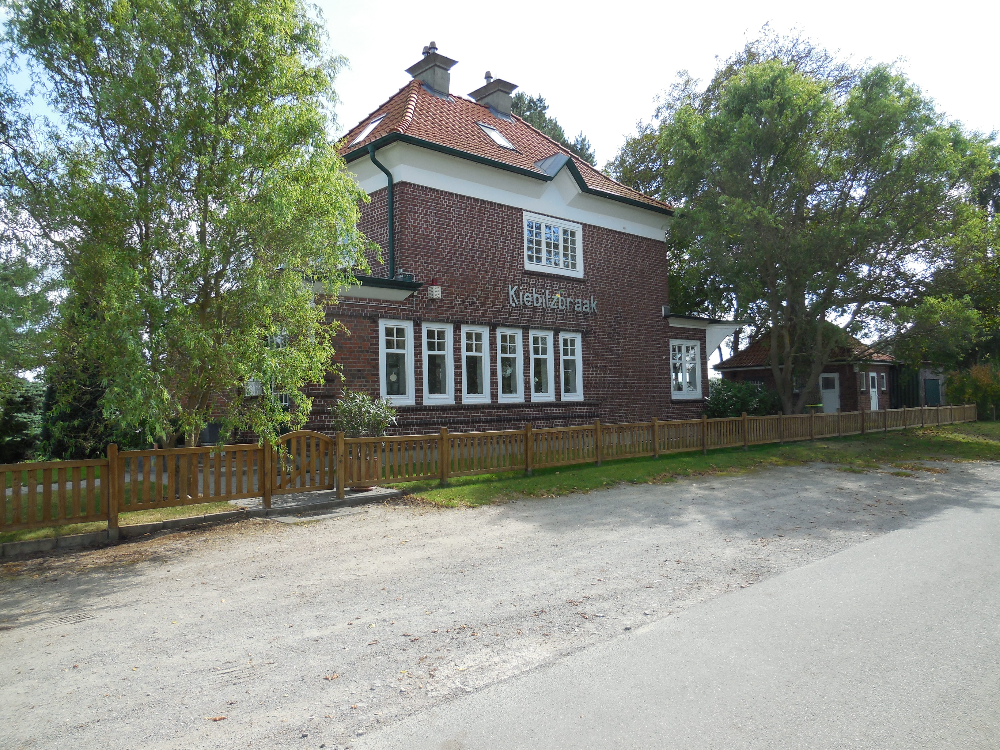 ehemaliger Bahnhof Kiebitzbraak der Hamburger Marschbahn